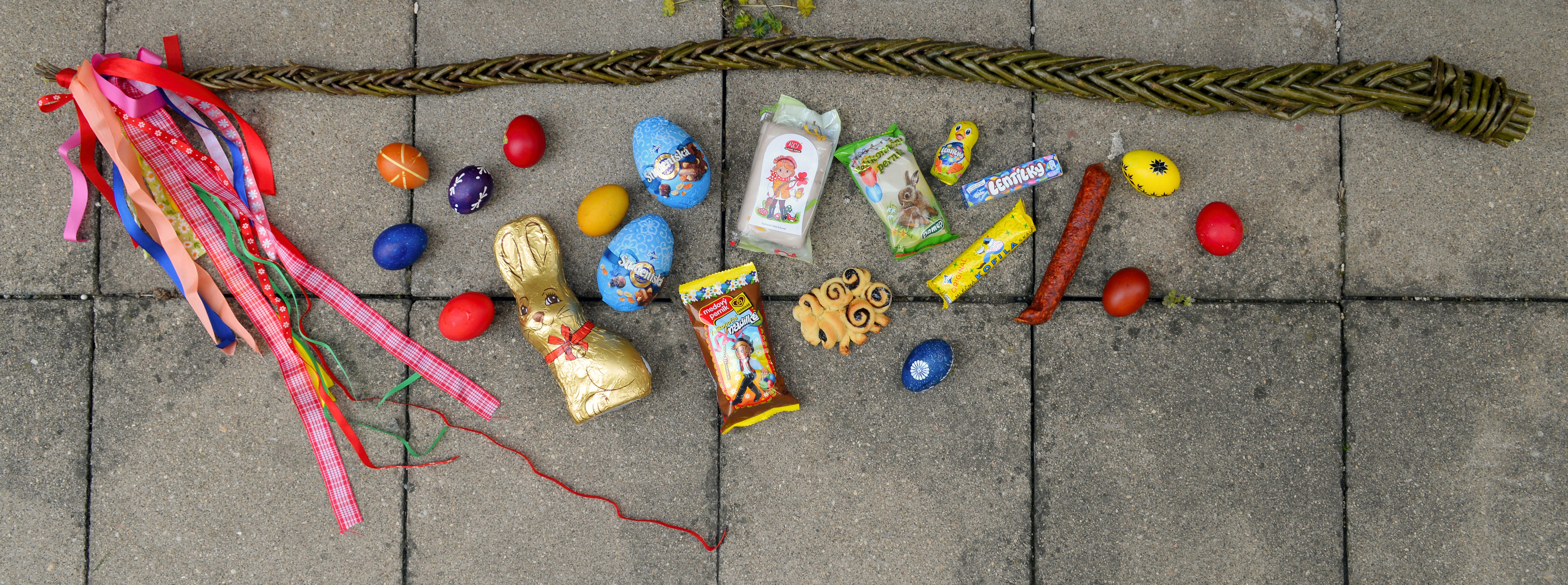 Pomlázka z dvanácti prutů s moderní výslužkou.